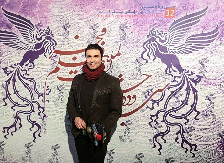 محمدرضا فروتن - ۱۳۹۲